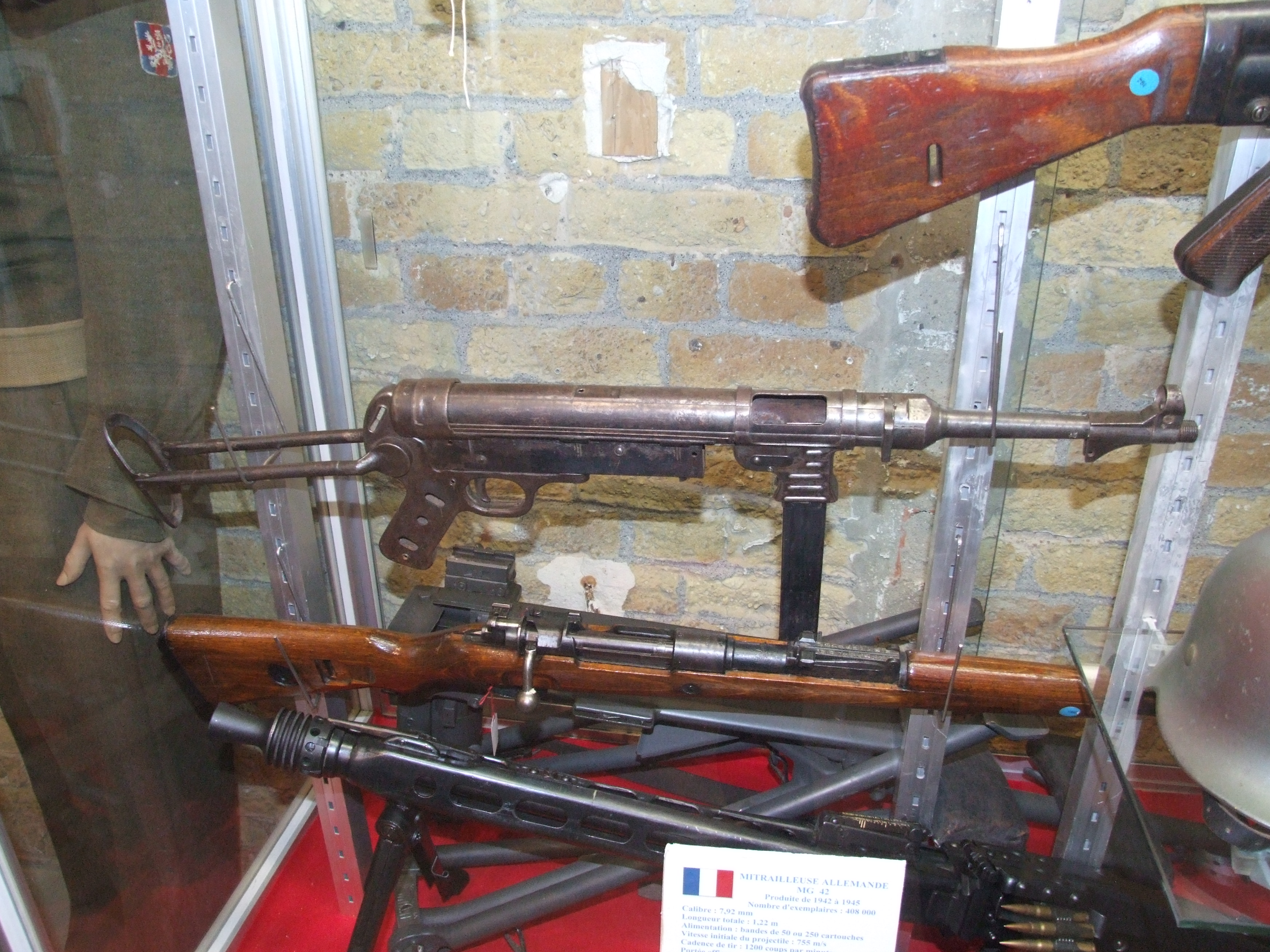 Schauvitrine mit deutschen Handfeuerwaffen im Mémorial du Souvenir, Dünkirchen; oben Maschinenpistole 40 (MP 40)